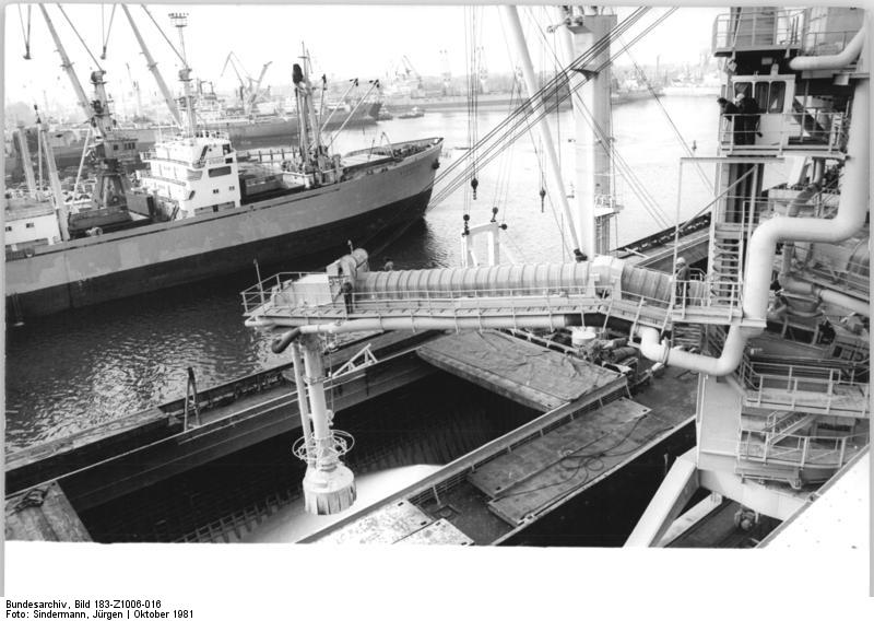 Wismar, Seehafen, Kali-Verladeanlage ADN-ZB Sindermann 6.10.81 Bez. Rostock: Drei Wochen vorfristig nahm im Seehafen Wismar eine neue Anlage für den Kali-Umschlag ihren Betrieb auf. Stündlich 600 Tonnen des begehrten Exportgutes können durch diese erste Baustufe des Umschlagkomplexes auf die Frachtschiffe verladen werden. Nach seiner endgültigen Fertigstellung 1983 werden hier jährlich 2, 5 Millionen Tonnen Düngemittel umgeschlagen.